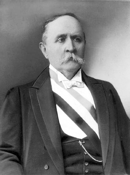 Ramón Barros Luco (Santiago, 9 de junio de 1835 - Santiago, 20 de septiembre de 1919) fue Presidente de Chile.